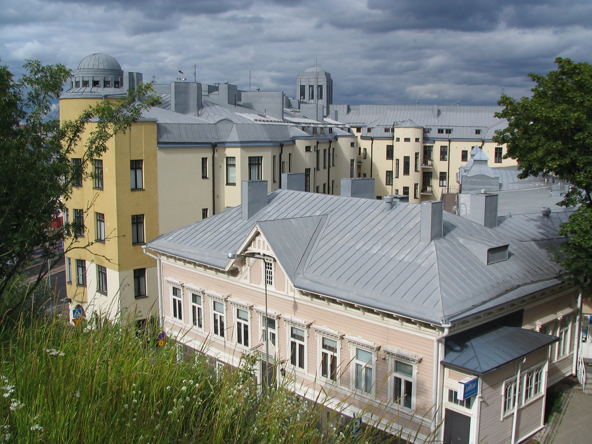 Buildings in Ruotsinsalmenkatu, Kotka